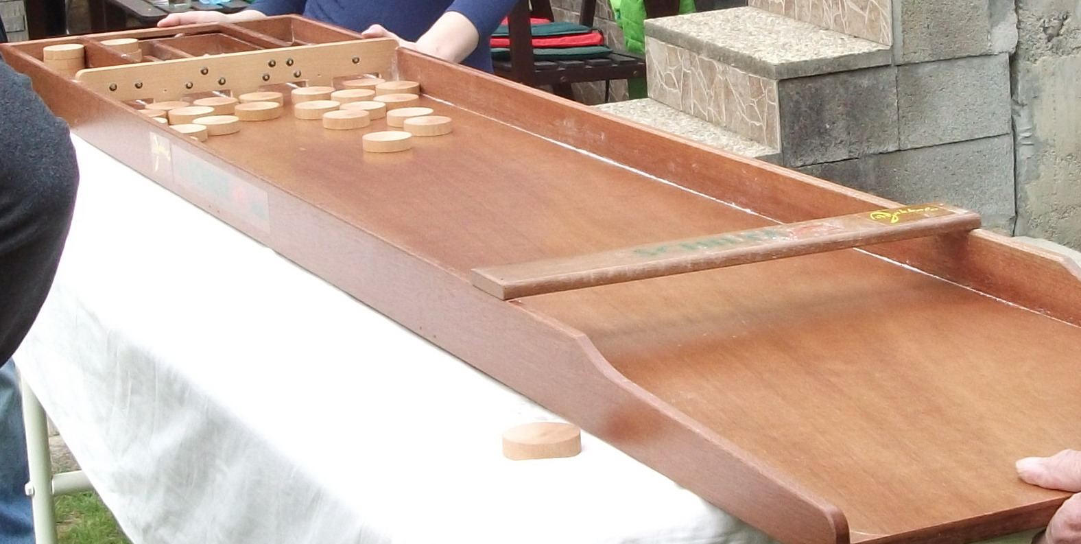 Šúľaná - doska s hracou plochou, odhodovou lištou, bodovými otvormi a koliečkami